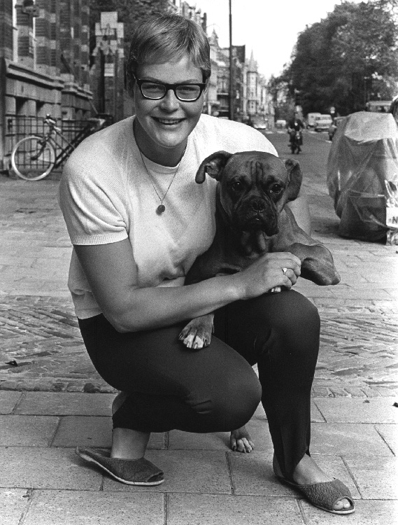 Zwemster Ada Kok met boxer, Amsteldijk tussen de Sint Willibrordusstraat en de Van Ostadestraat, 2 september 1963